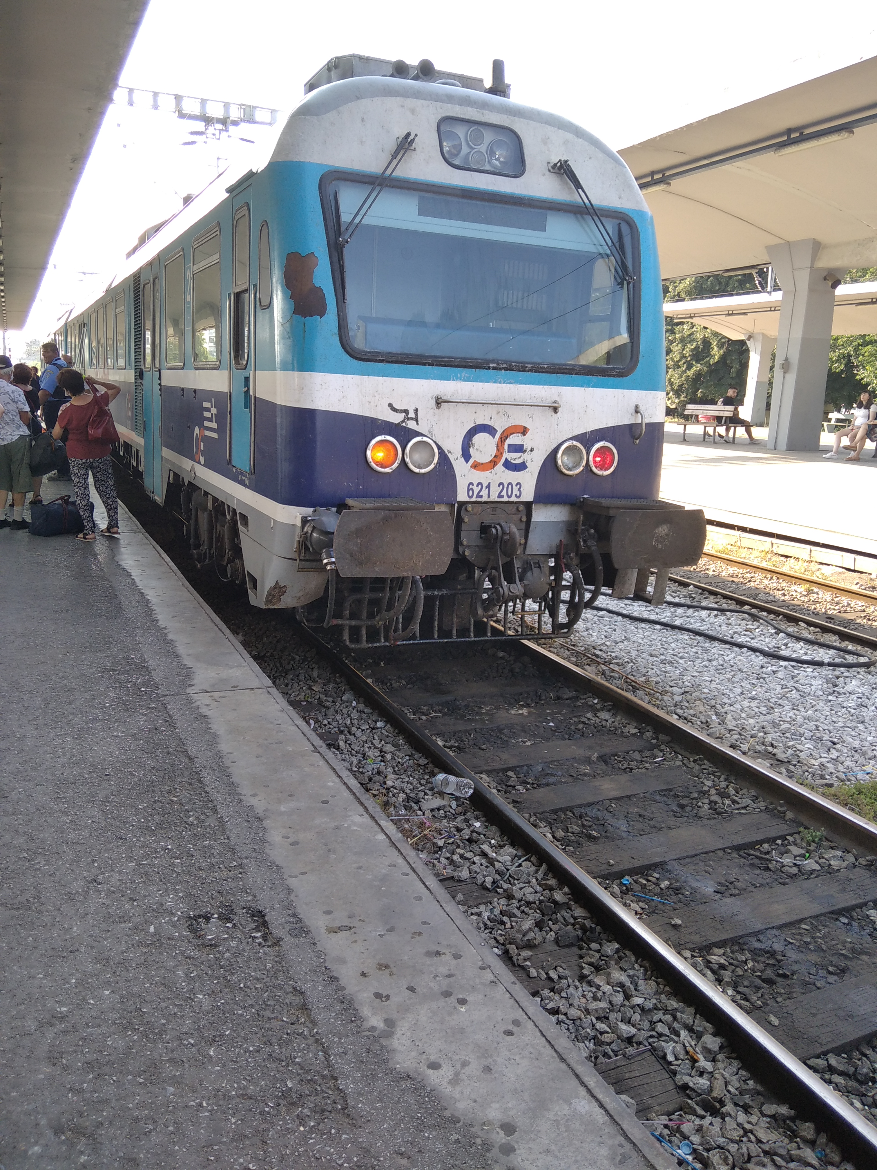 Το ΜΑΝ S 2000 με καθυστέρηση 3-7-2020 στον Σ.Σ. Θεσσαλονίκης (IC 3632) Θεσσαλονίκη-Σέρρες